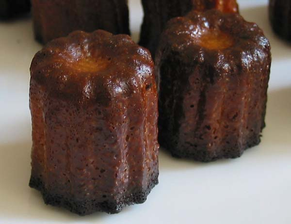 Illustration pour la recette des canelés bordelais